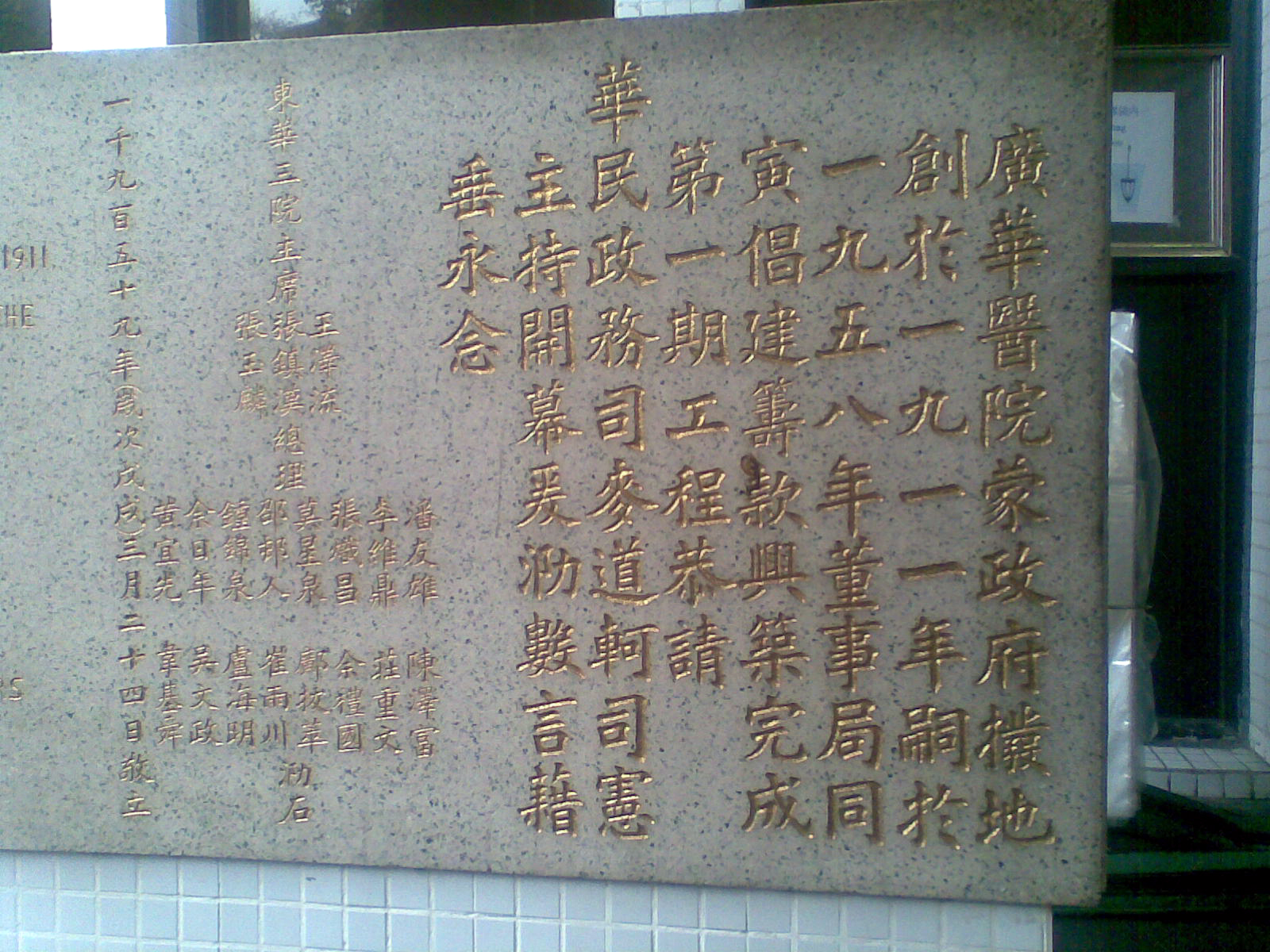 廣華醫院第一期擴建紀念基石